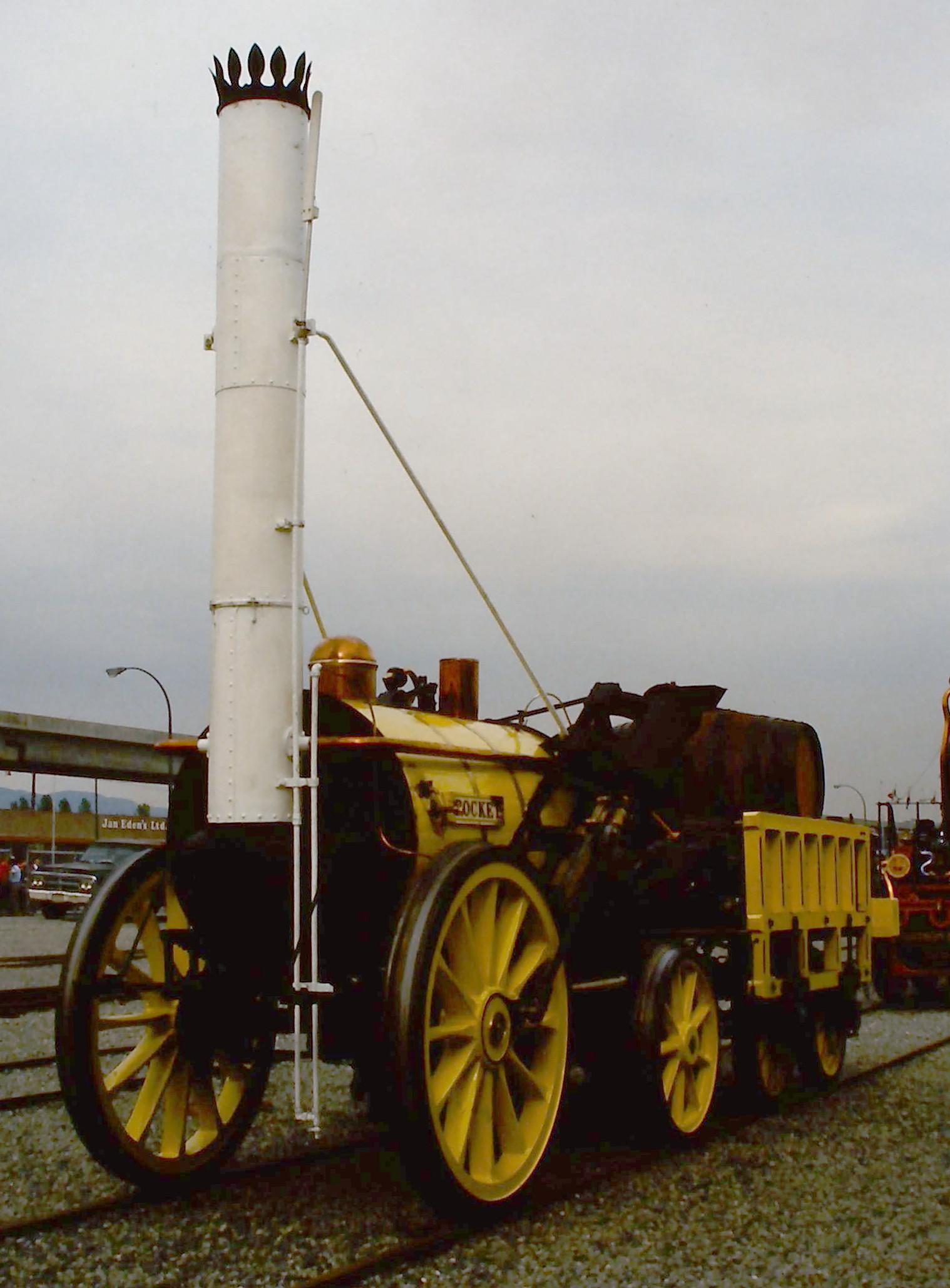 Dampflokomotive Rocket (Replikat) auf der SteamExpo 86 in Vancouver